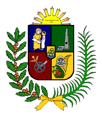 Escudo del municipio Juan José Mora, estado Carabobo, Venezuela